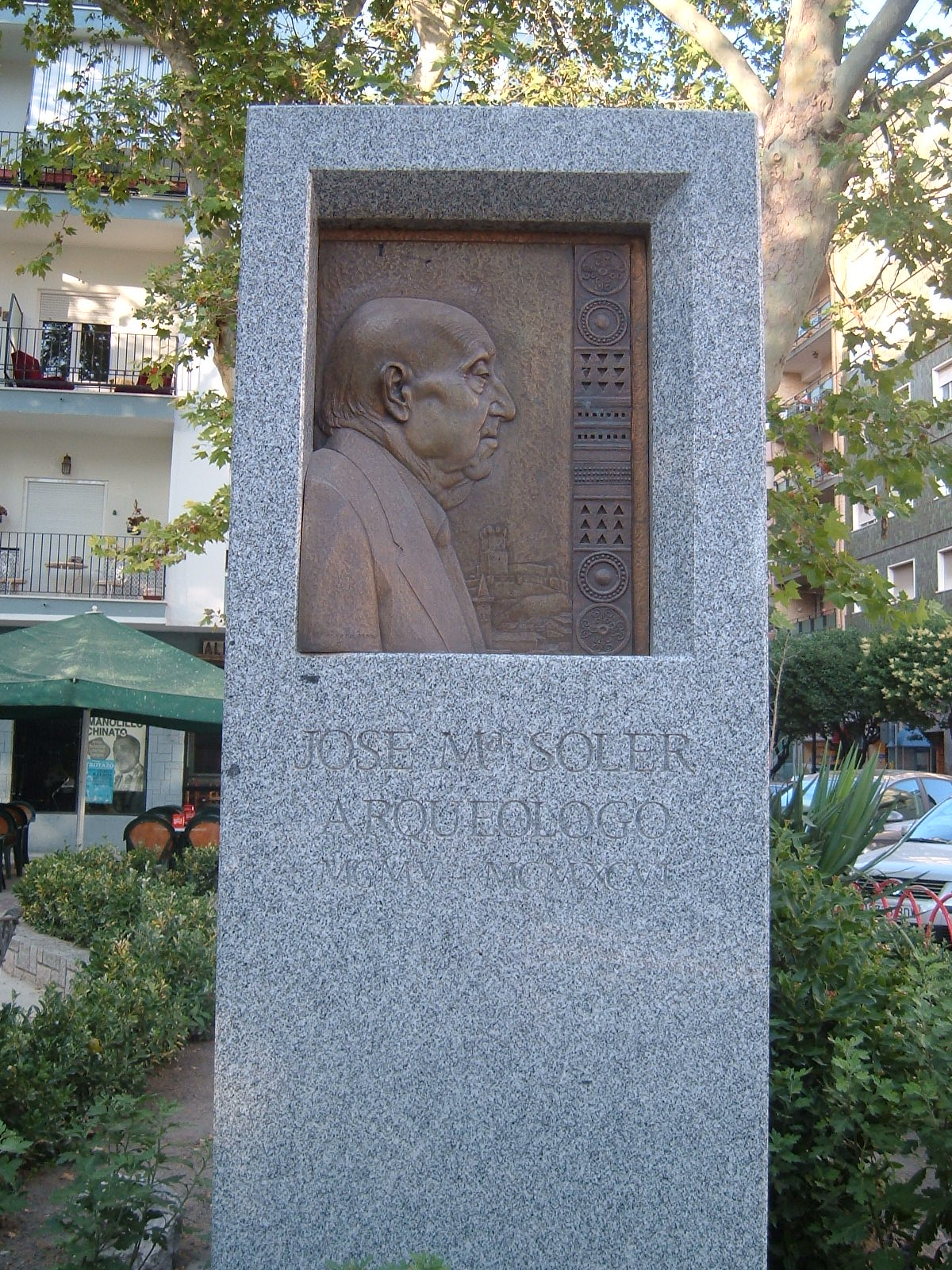 Monument a José María Soler.